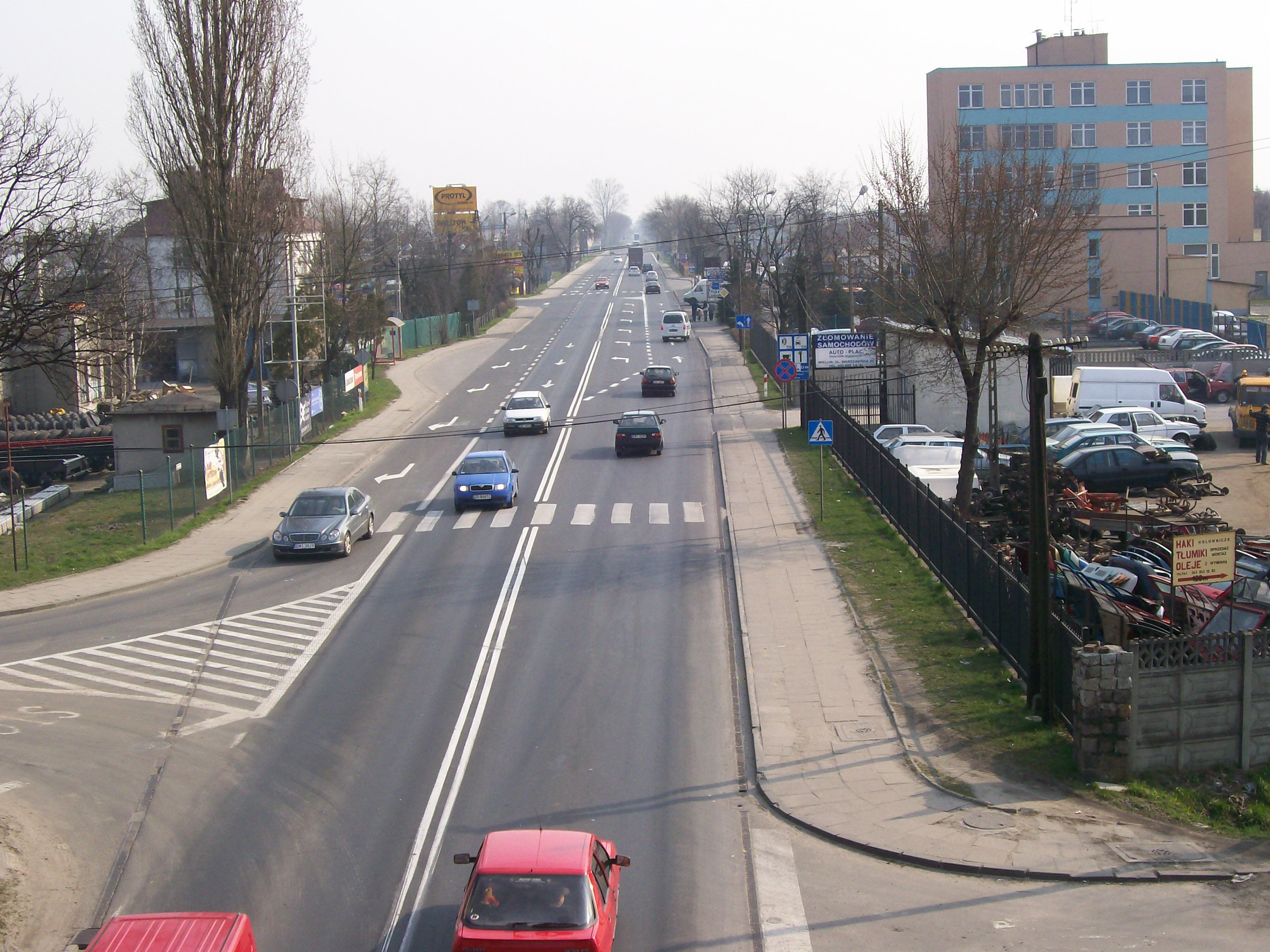 Polen: Europastraße 67 (Droga krajowa 8) in Wieluń